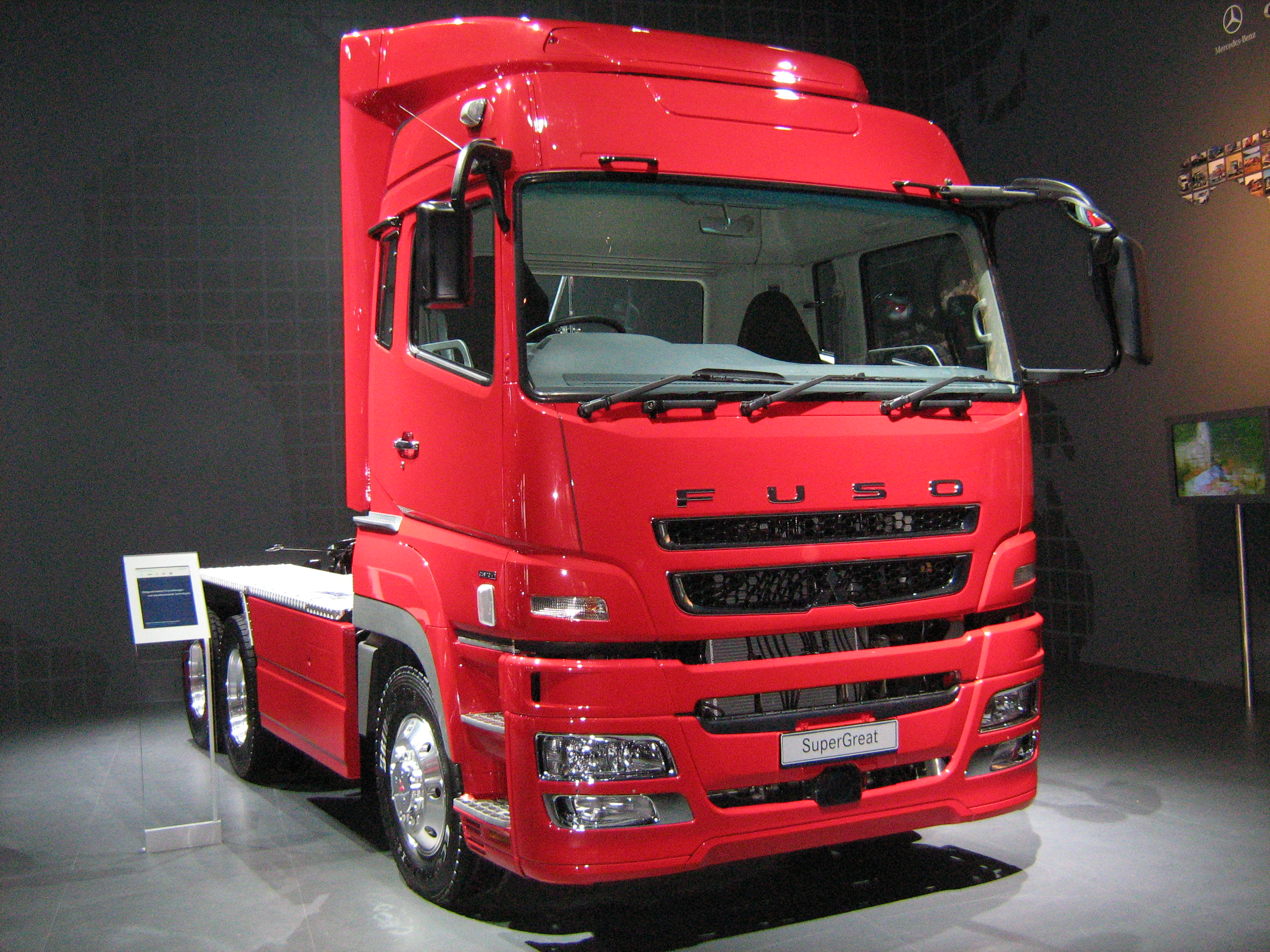 der große Fuso LKW auf der IAA 2008.